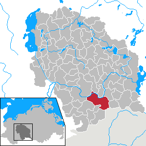 Siggelkow in Mecklenburg-Vorpommern - District Parchim